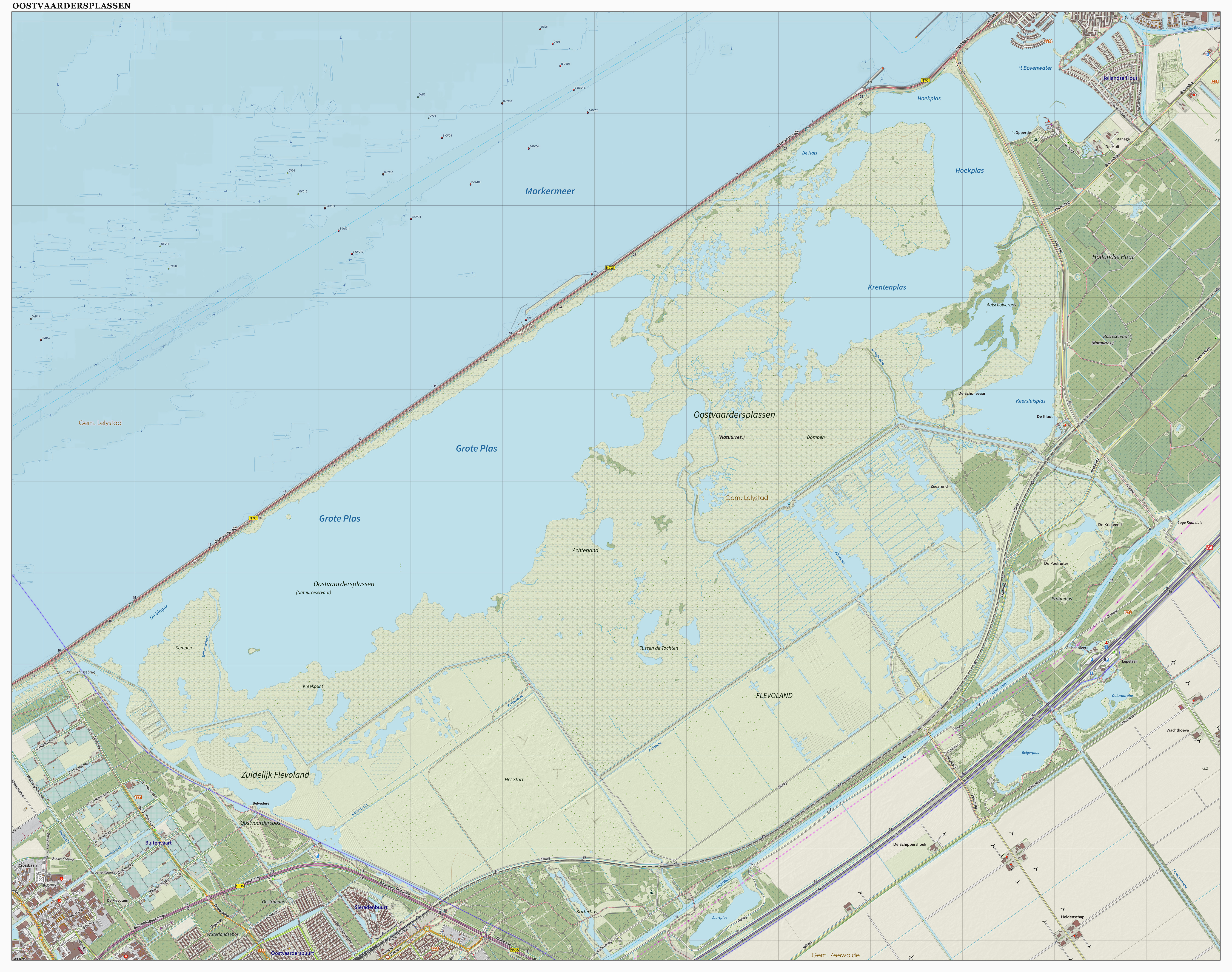 Topografische kaart van de Oostvaardersplassen (natuurgebied). Resolutie: 400 pixels/km. Samengesteld door Jan-Willem van Aalst op basis van de GML open geodata van de BRT/Top10NL (basisregistratie Topografie, Kadaster), vrijgegeven door Kadaster onder de Creative Commons BY licentie. Additionele gegevens uit BAG uit de Open Street Map en uit de Risicokaart. Zie ook de Legenda.